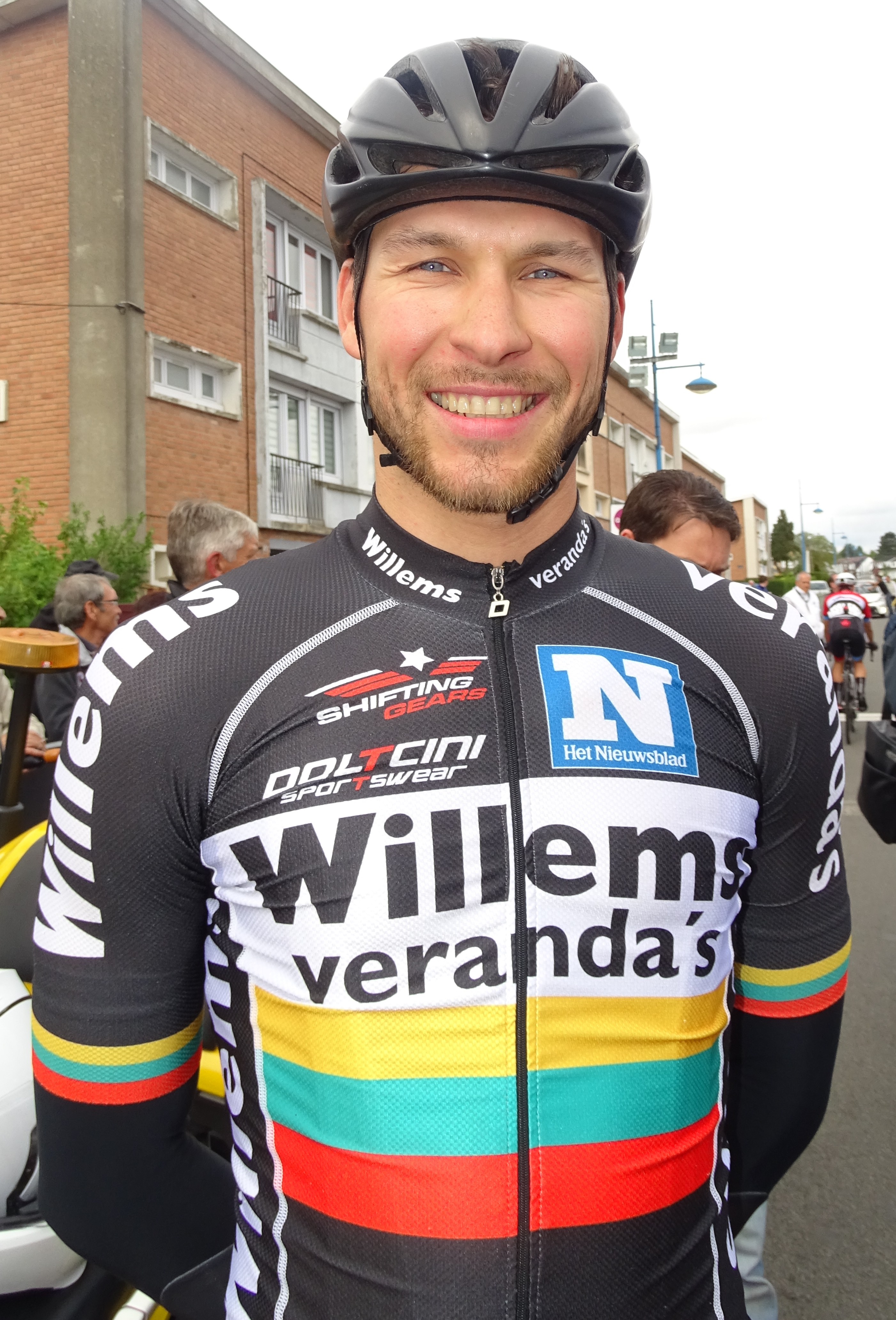 Reportage réalisé le vendredi 20 mai 2016 à l'occasion du départ de la première étape du Paris-Arras Tour 2016 à Douchy-les-Mines, Nord, Nord-Pas-de-Calais-Picardie, France.